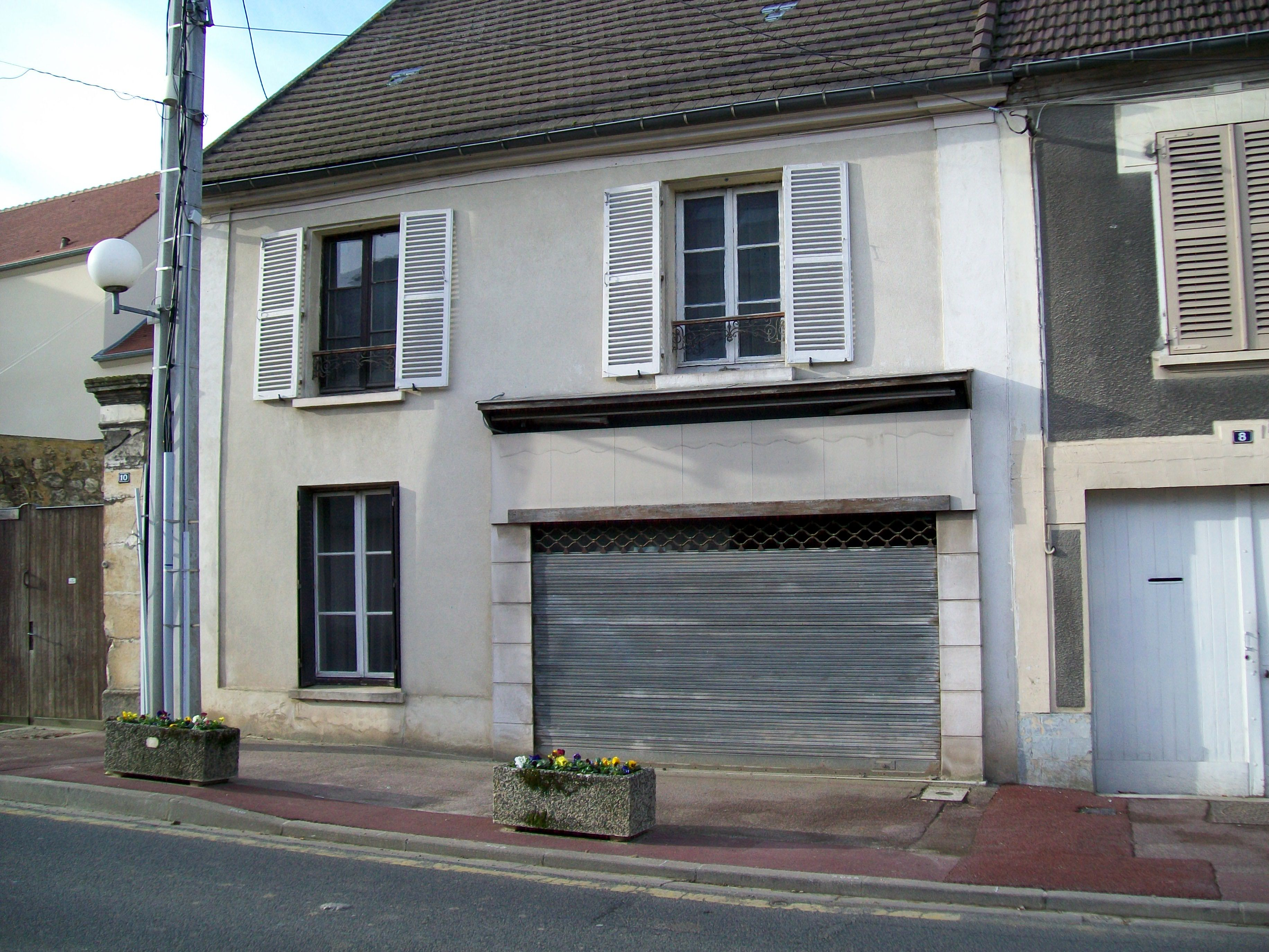 L'une des anciennes boutiques de la Grande Rue, fermées depuis de nombreuses années pour leur majeure partie; développement sans doute irreversible.